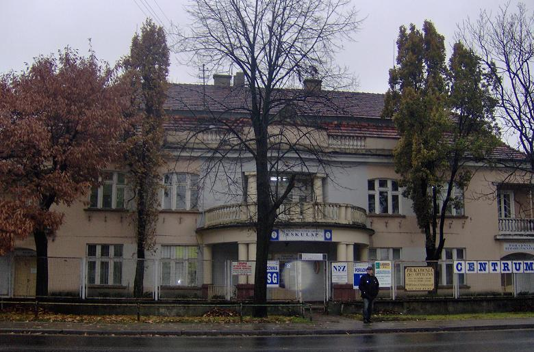 Kutno, ul. Mickiewicza 2 - Willa Izaaka Holcmana